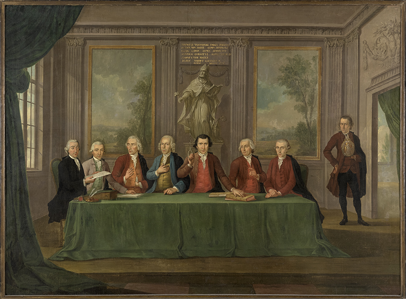 Het bestuur van het Brugse smedenambacht (Bernardus Fricx, 1783); collection: Musea Brugge - Groeningemuseum